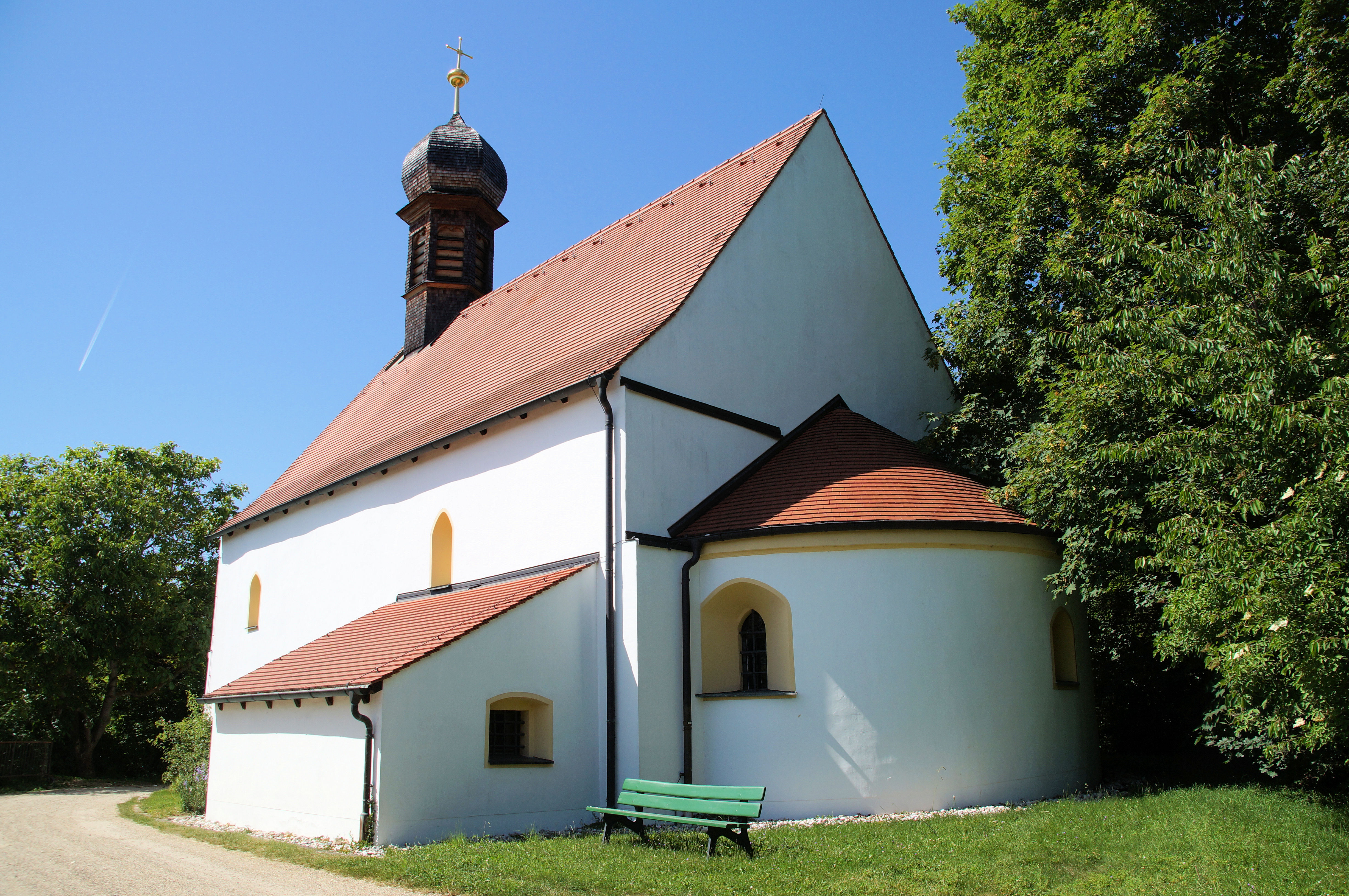 Katholische Neben- und Wallfahrtskirche St. Michael, Saalbau mit Satteldach, eingezogener Apsis und Dachreiter mit Zwiebelhaube, romanisch, vor 1182, Umbauten im 17. Jahrhundert; mit Ausstattung This is a photograph of an architectural monument.